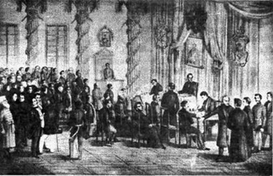 Собор русcких ученых во Львове (1848)